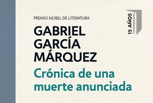 Detalle de la portada de "Crónica de una muerte anunciada" publicada por DeBolsillo